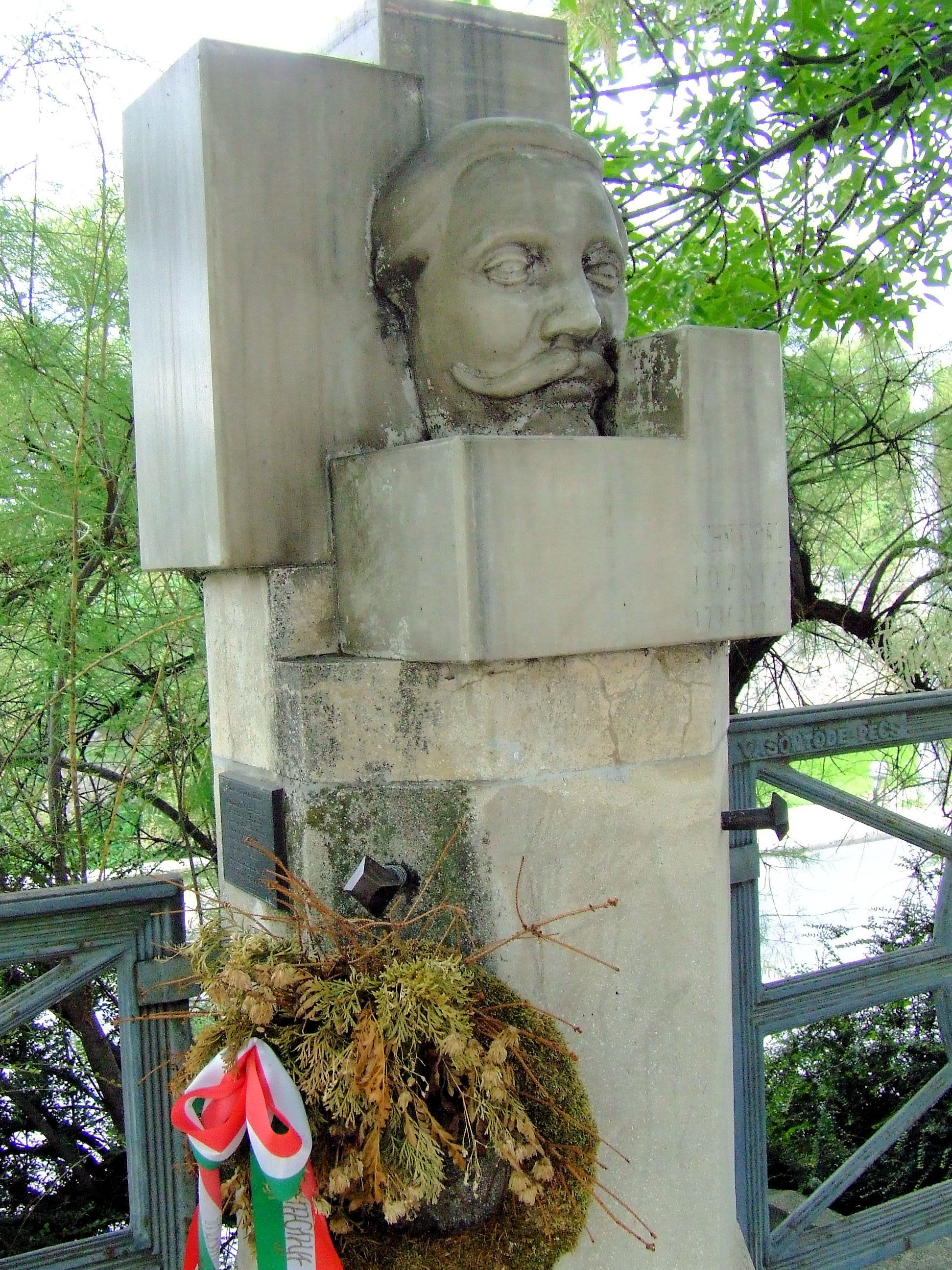 Schweidel József honvéd vezérőrnagy, aradi vértanú szobra Pécsen. Az Új Dunántúli Napló Szerkesztősége, Képző és Iparművészeti Lektorátus, Baranya Megyei Közgyűlés, a Pécsi Polgárbál közönsége, dr. Jobst K. és P. család adománya. Bencsik István szobrászművész alkotása